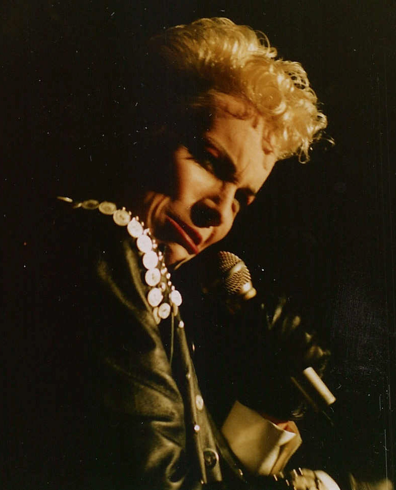 Annie Lennox beim Eurythmics-Auftritt, Rock am Ring 1987